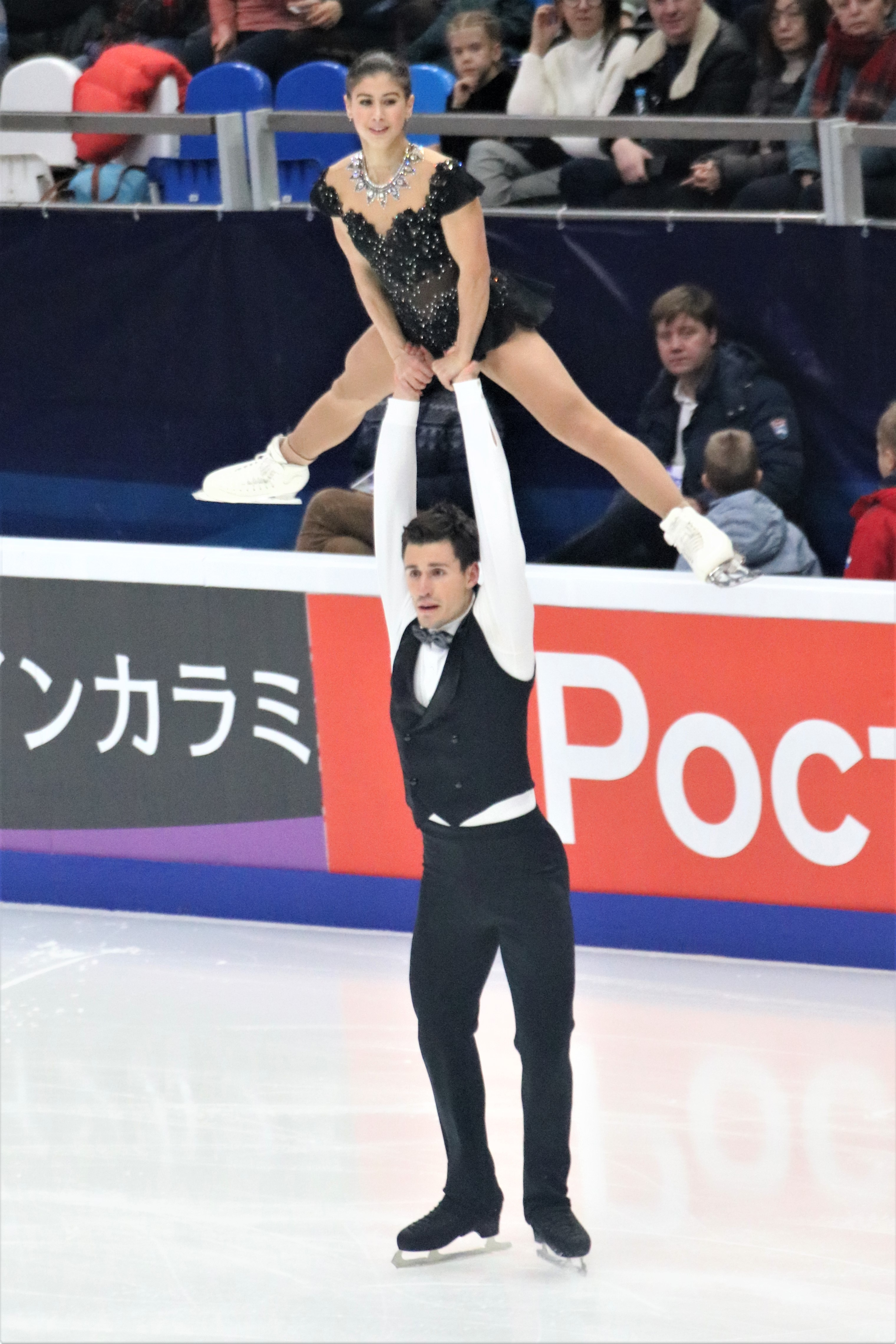 Ребекка Гиларди / Филиппо Амброзини (Италия) на Rostelecom Cup 2019